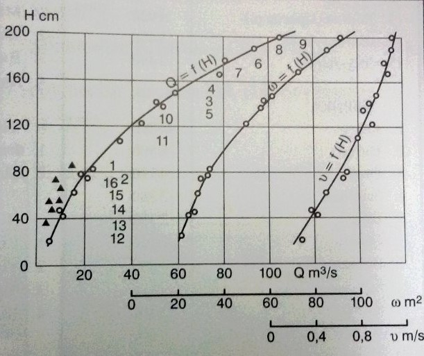 Српски (ћирилица): Три карактеристике криве: крива протицаја Q=f(H), крива површине овлаженог профила w=(H) и крива брзине воде v=f(H) са одговарајућим јединицама на ординати и апсциси.